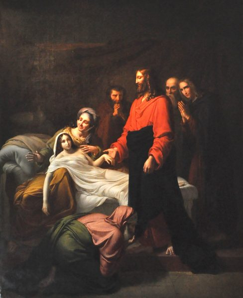 Jésus ressuscitant la fille de JaïreRaising of Jairus' daughtertitle QS:P1476,fr:"Jésus ressuscitant la fille de Jaïre" label QS:Lfr,"Jésus ressuscitant la fille de Jaïre" label QS:Len,"Raising of Jairus' daughter"